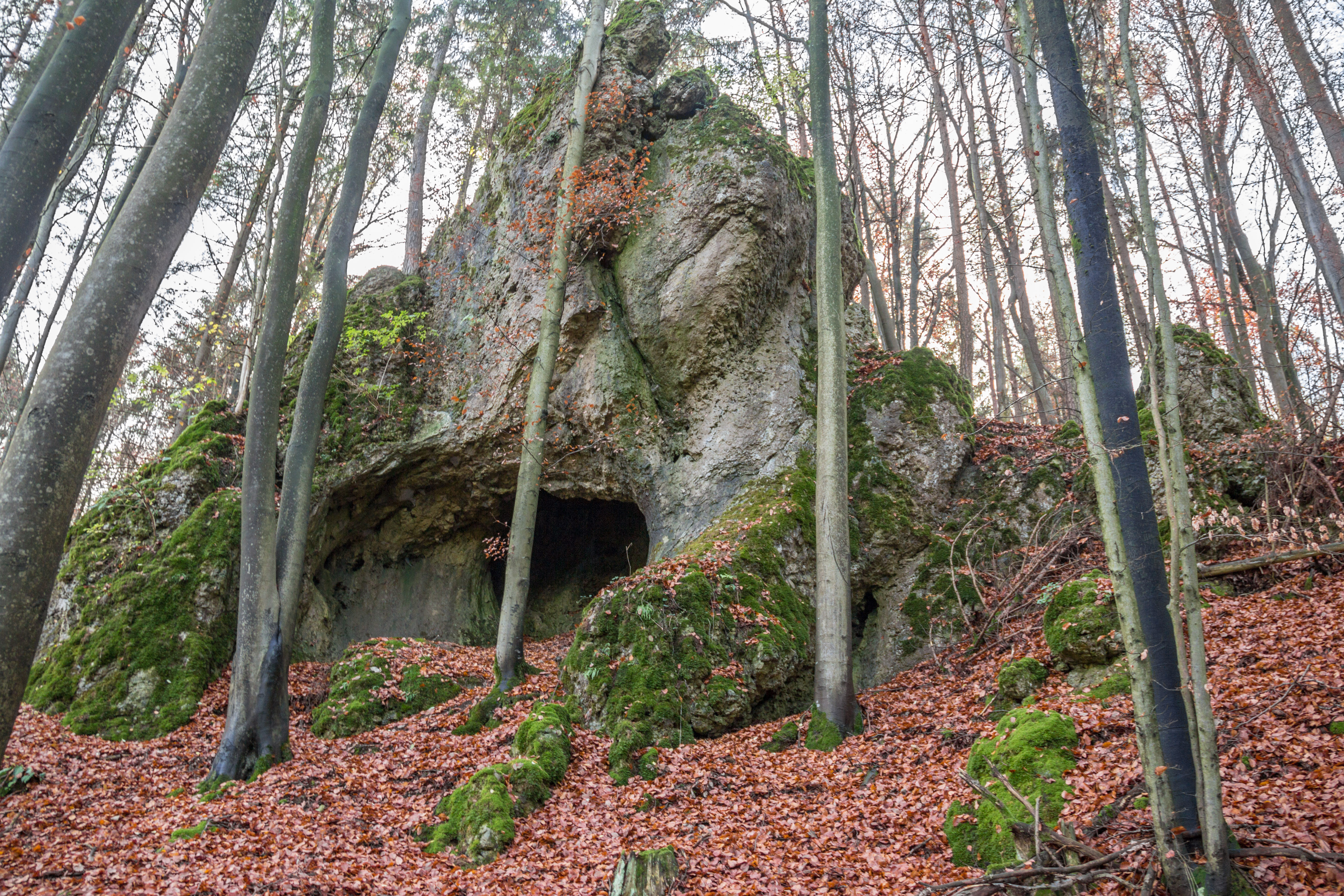 Felsen, Bocksloch, Höhle, Affalterthal